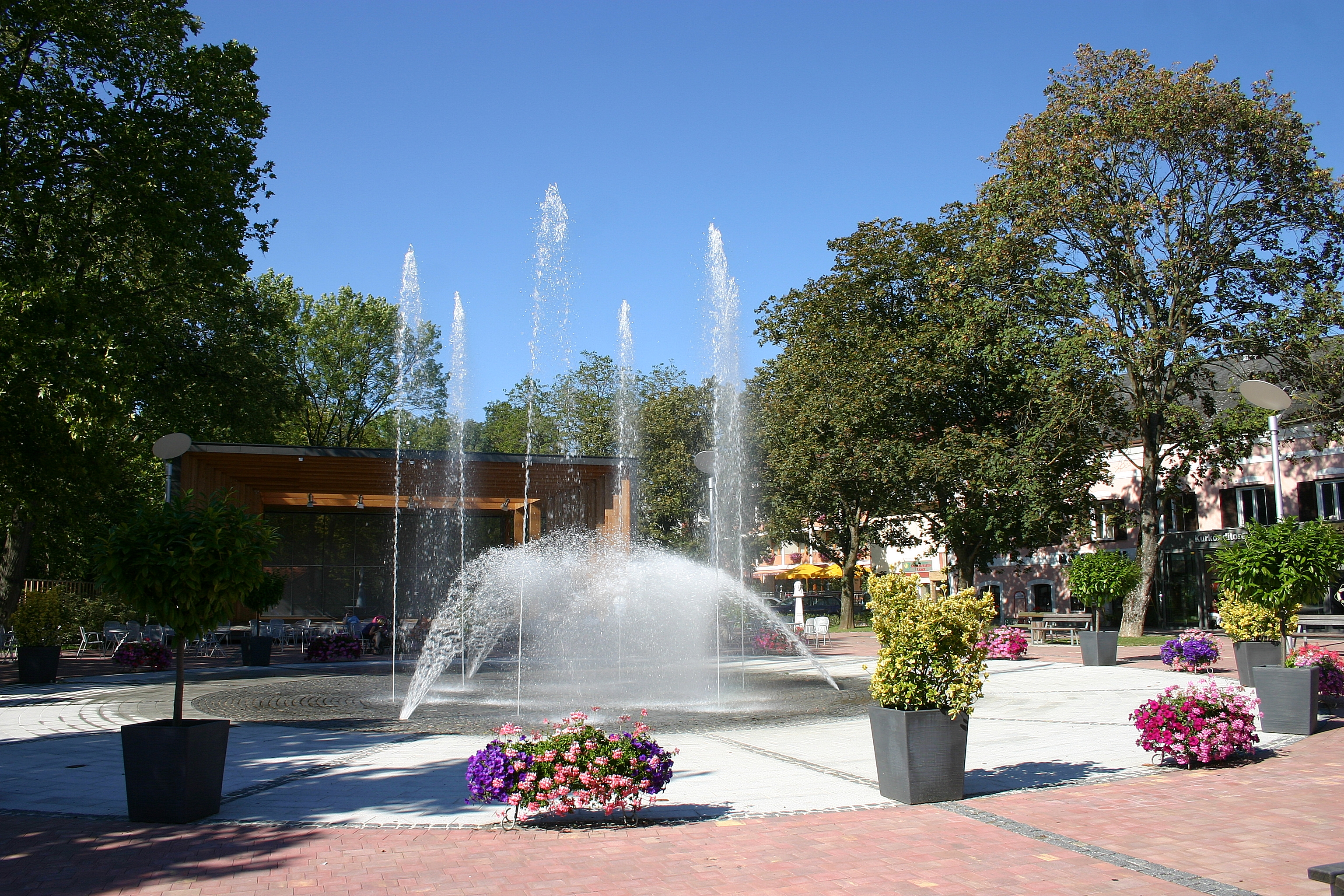 Bad Tatzmannsdorf Springbrunnen und Musikpavillon